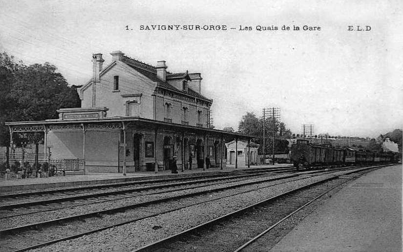 Les quais de la nouvelle gare construite en 1903-1904, peu après sa mise en service.